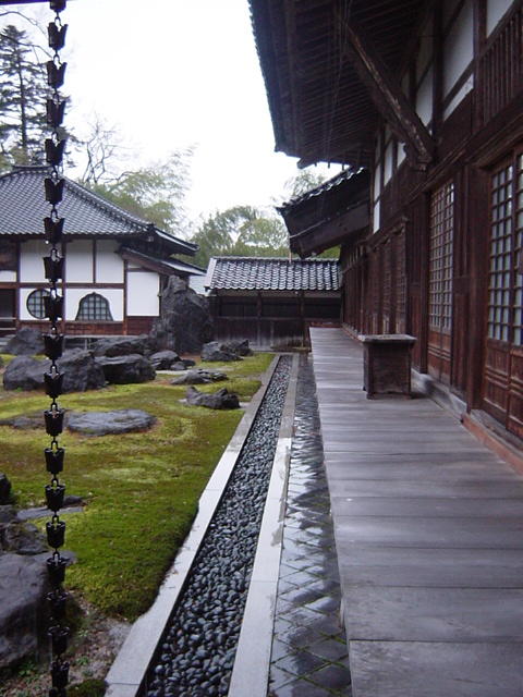 Kokutai-ji in Toyama, Japan